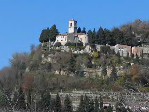 foto del santuario di Santa Maria riomas